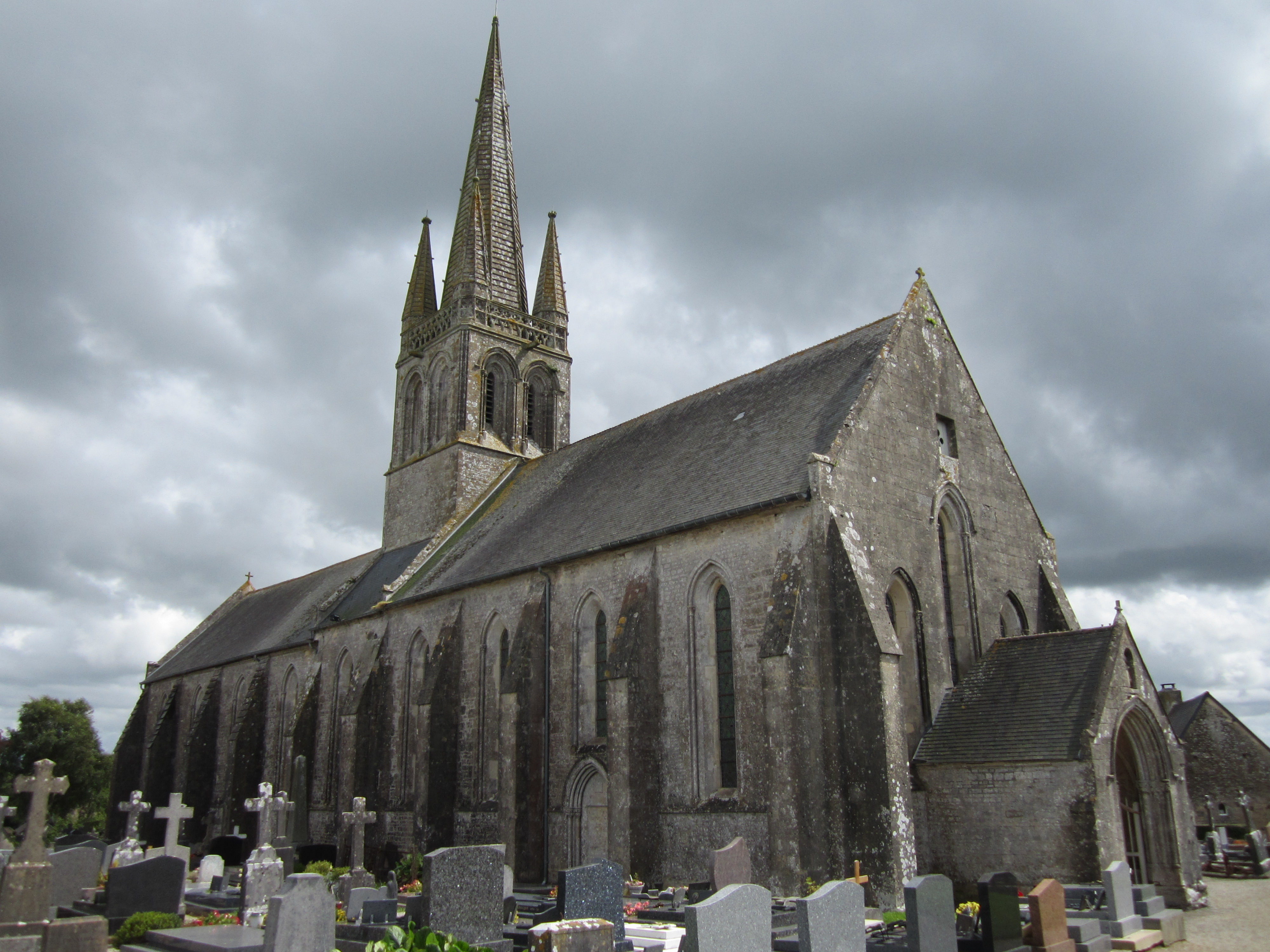 Église Saint-Georges de Colomby .